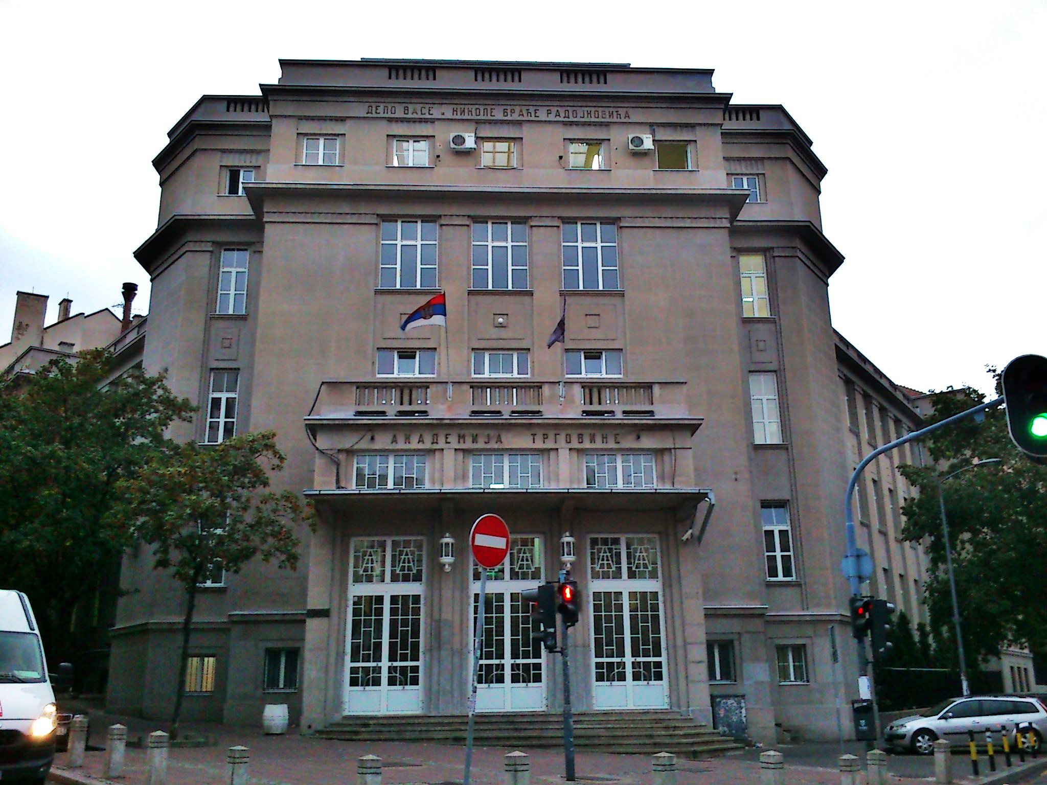 Зграда Економске школе „Владимир Перић-Валтер“